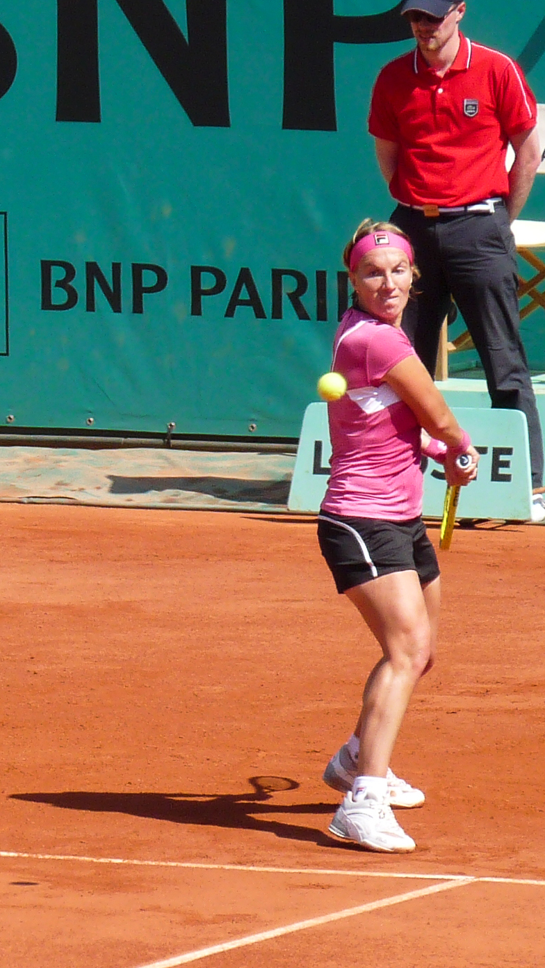 Svetlana Kuznetsova vs Sorana Cirstea